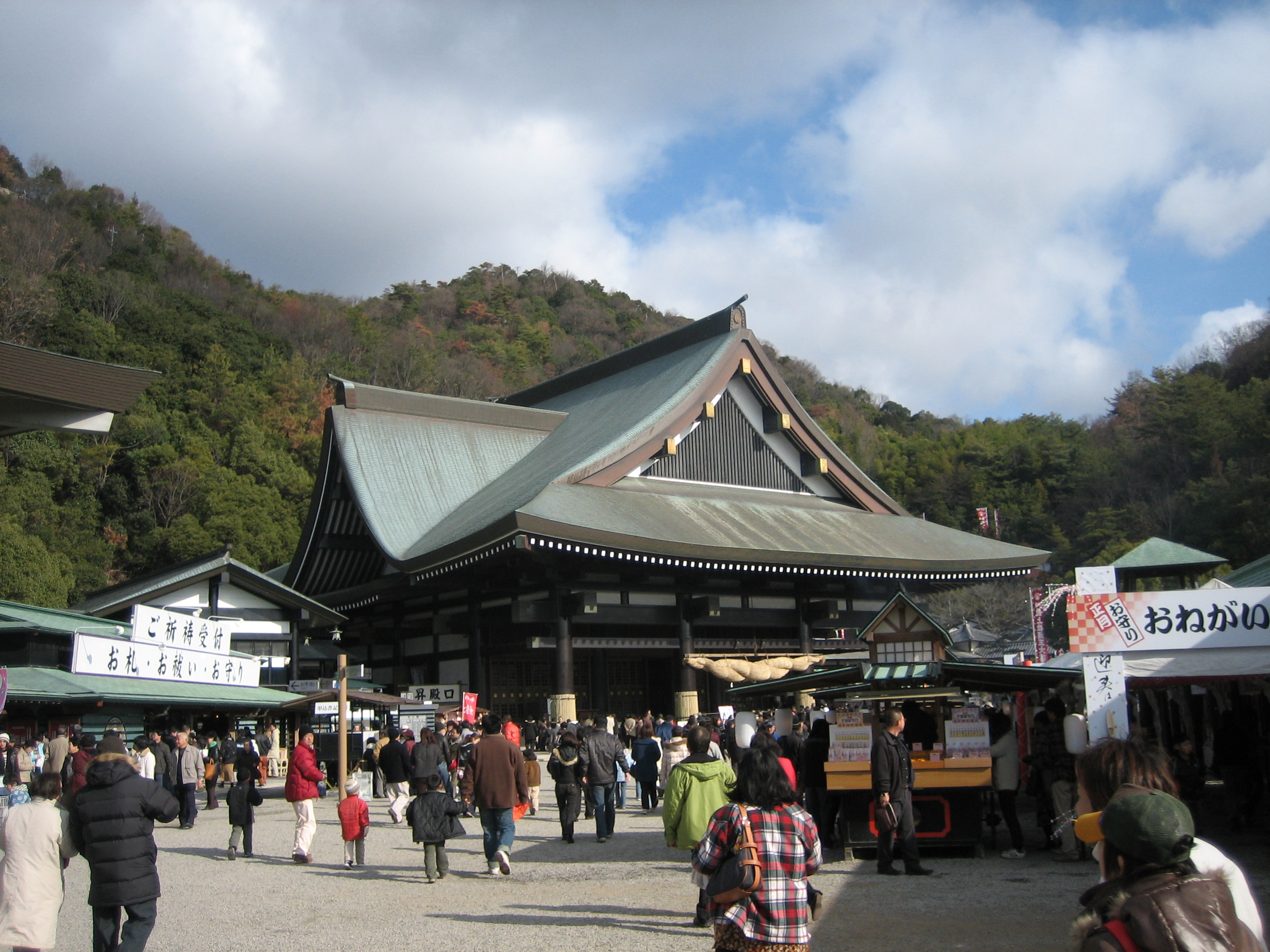 Reiko-den(main hall)